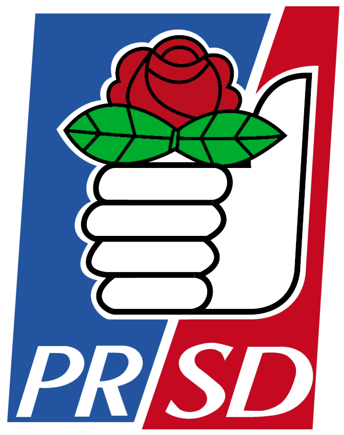 Emblema del Partido Radical Socialdemócrata de Chile.